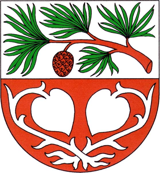 Znak obce Sosnová (okres Česká Lípa)